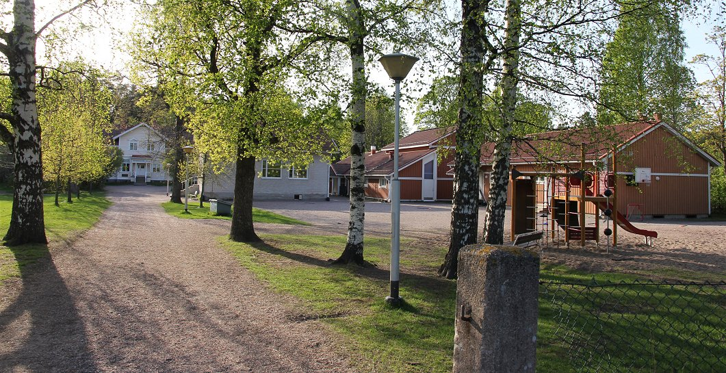 Västersundoms skola on Vantaan Länsisalmen kaupunginosassa sijaitseva pieni ja perinteikäs ruotsinkielinen alakoulu.